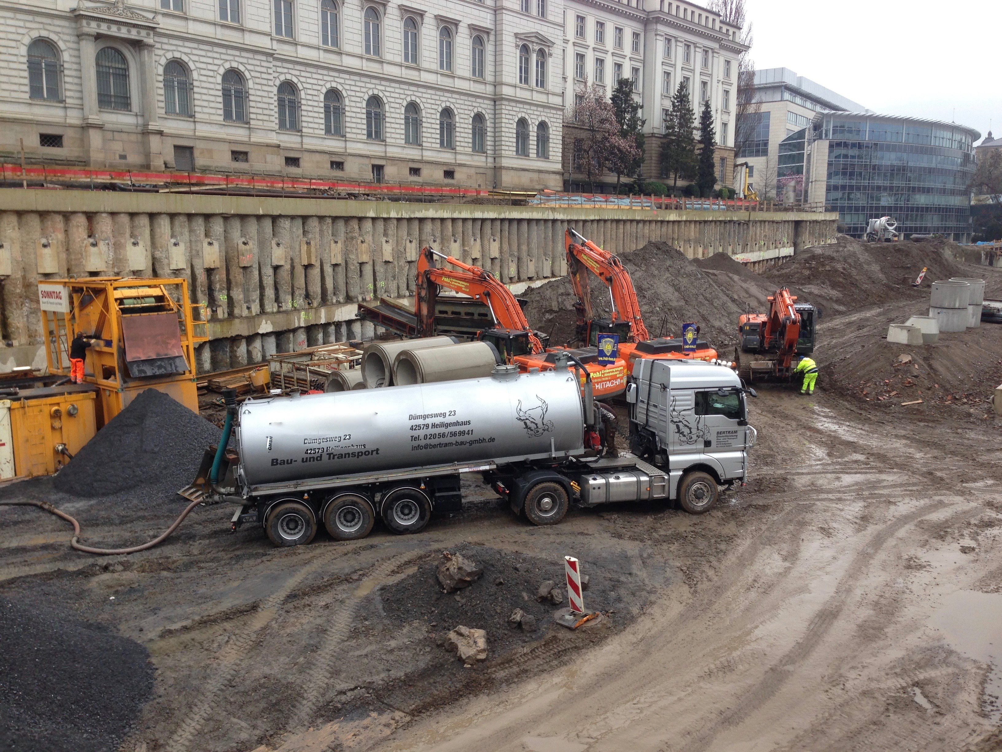 Baustellenfahrzeuge im Osten der Baustelle Döpeprsberg 2016